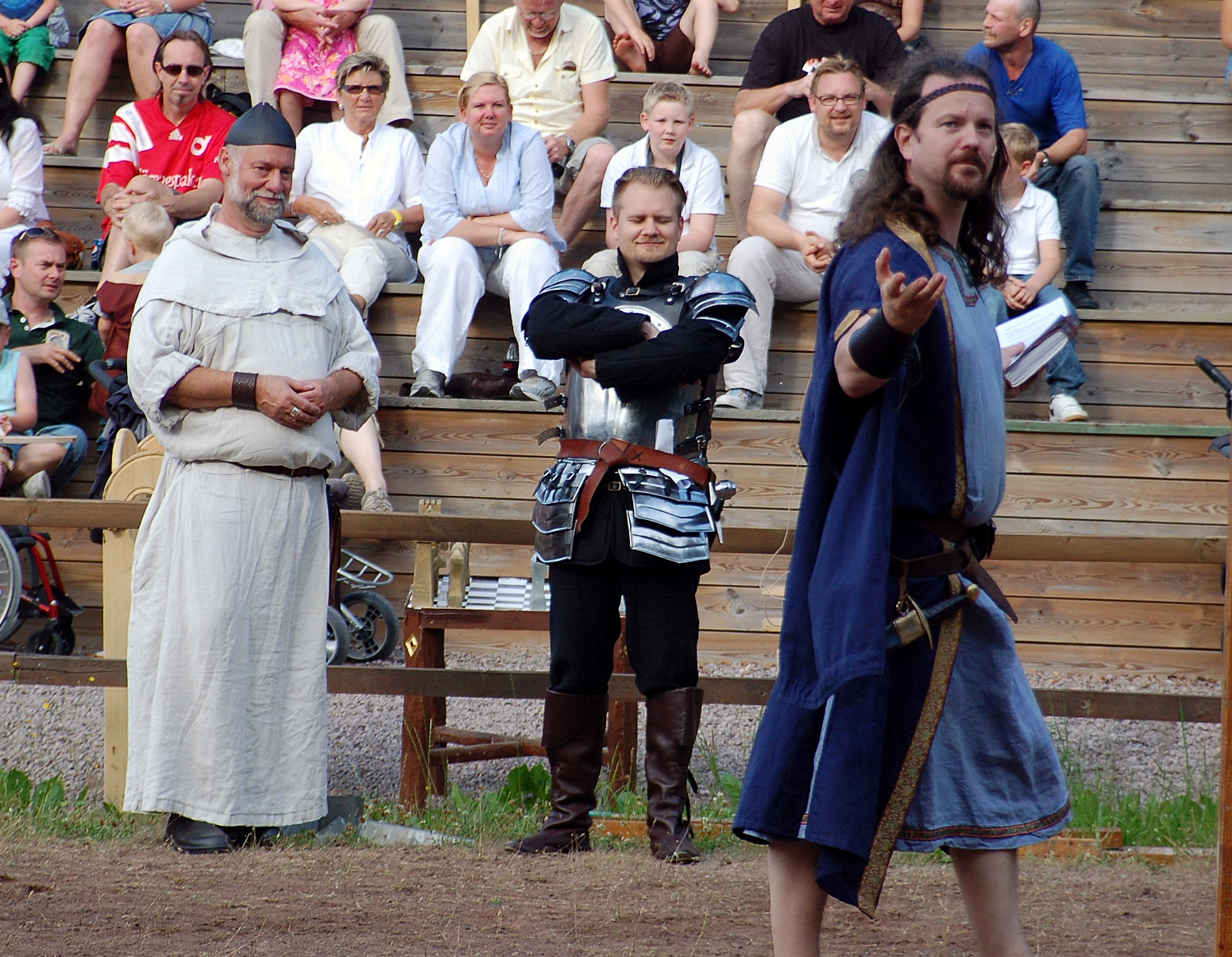 Riddarspelen i Hova 2011